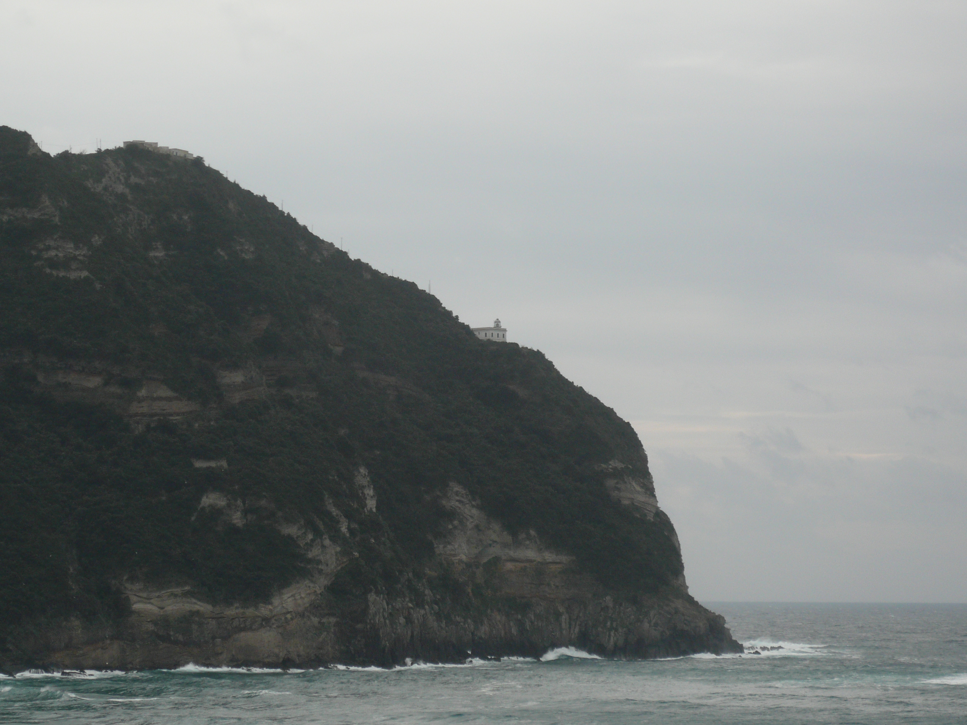 Punta Imperatore, nella frazione di Panza, è il punto più a ovest dell'isola d'Ischia sul quale è anche collocato un faro. Autore foto: Roberto De Martino